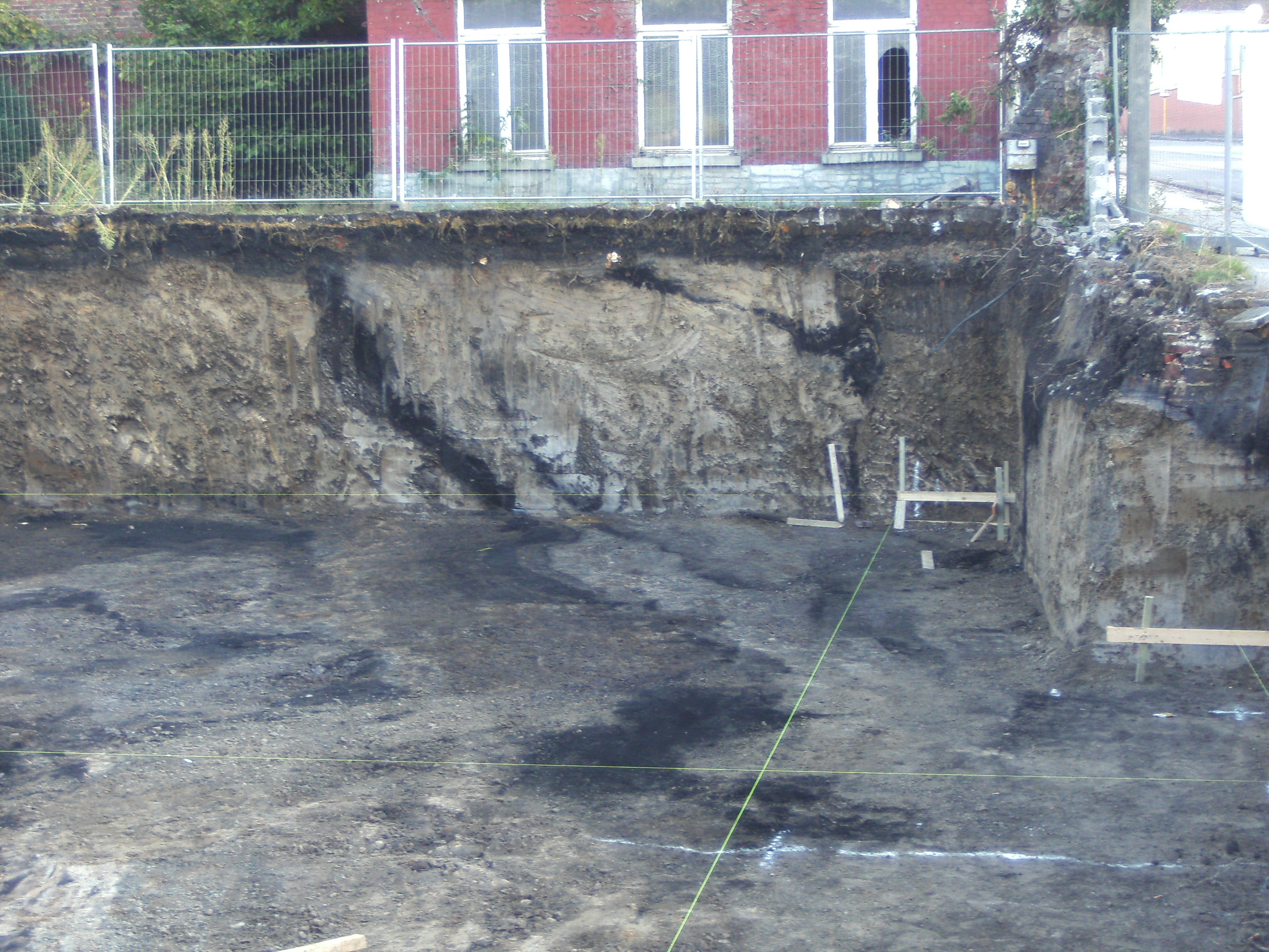 Charleroi (Belgique) - quartier de la Broucheterre - houille affleurante découverte lors d'un creusement de fondations pour un nouvel immeuble.